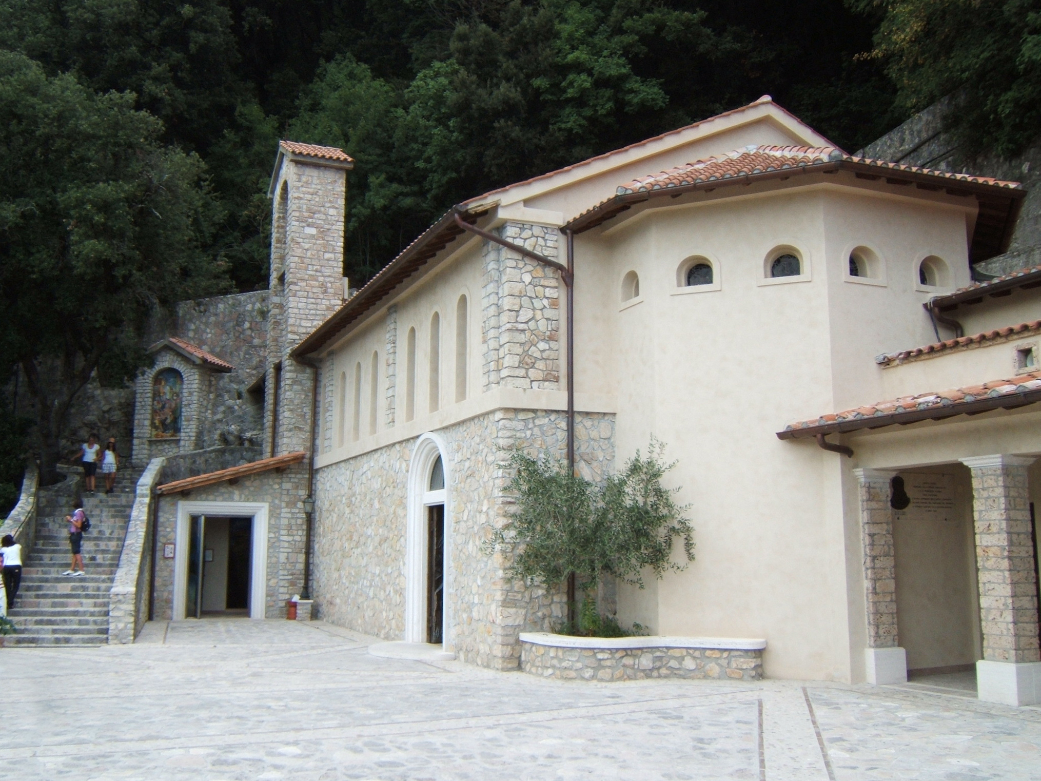 un angolazione del santuario di greccio